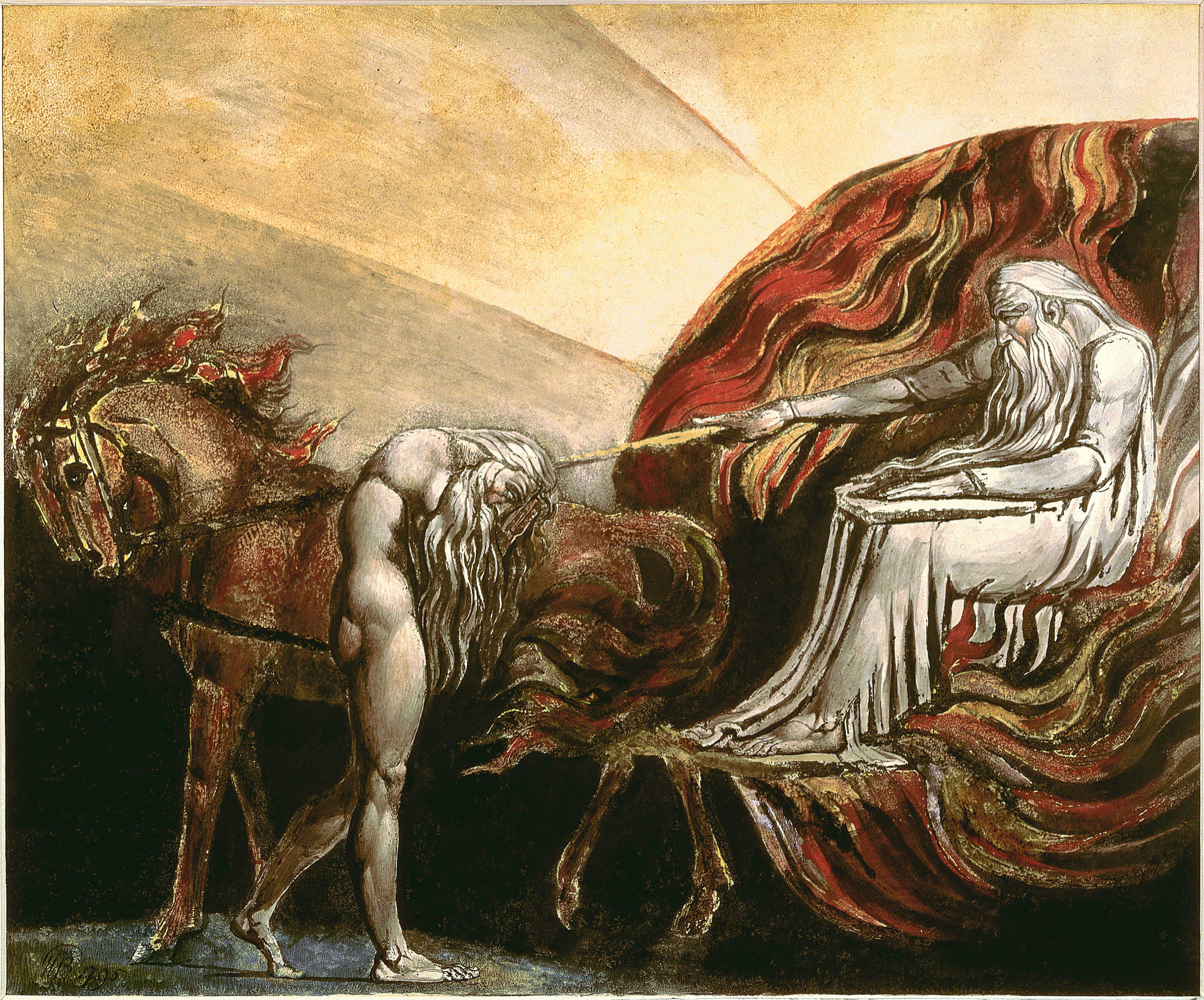 God Judging Adam